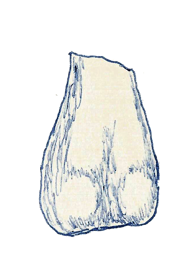 Illustration of a fossil of Fulgurotherium